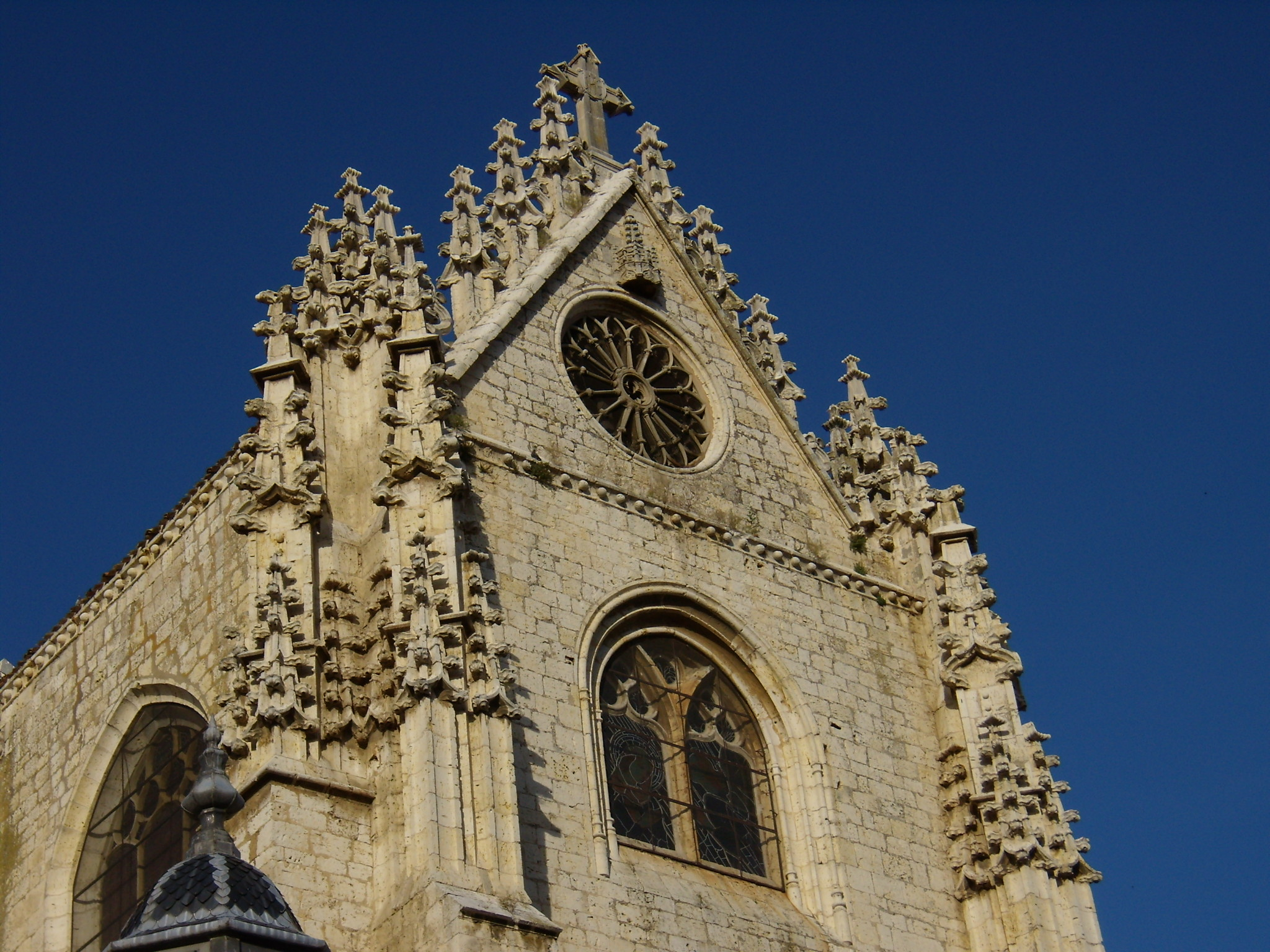 Detalle de la fachada de la plaza de San Antolín. Catedral de Palencia.